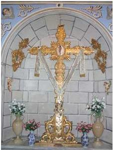 2ª Cruz de la Calle La Fuente